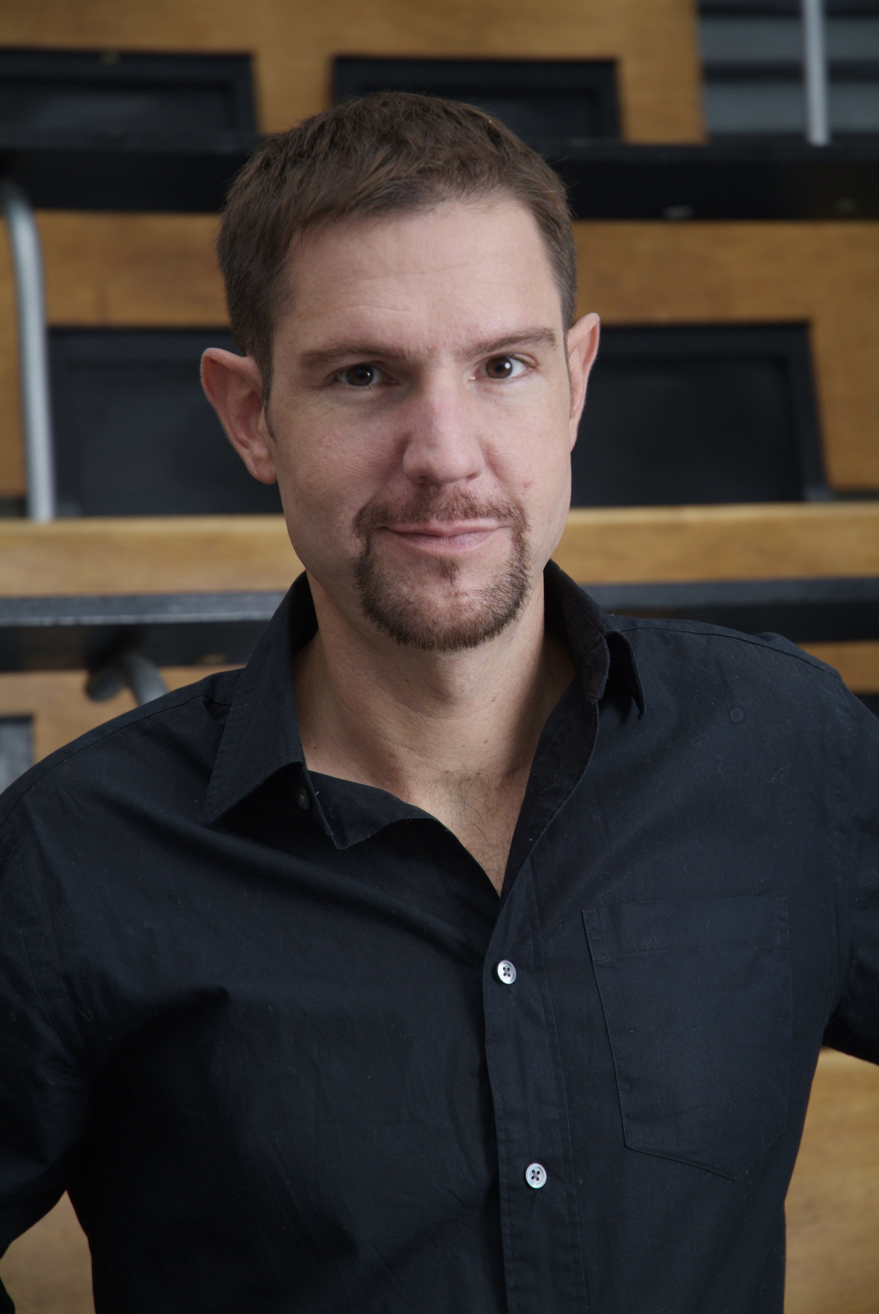 Porträt von Holger Schlageter.